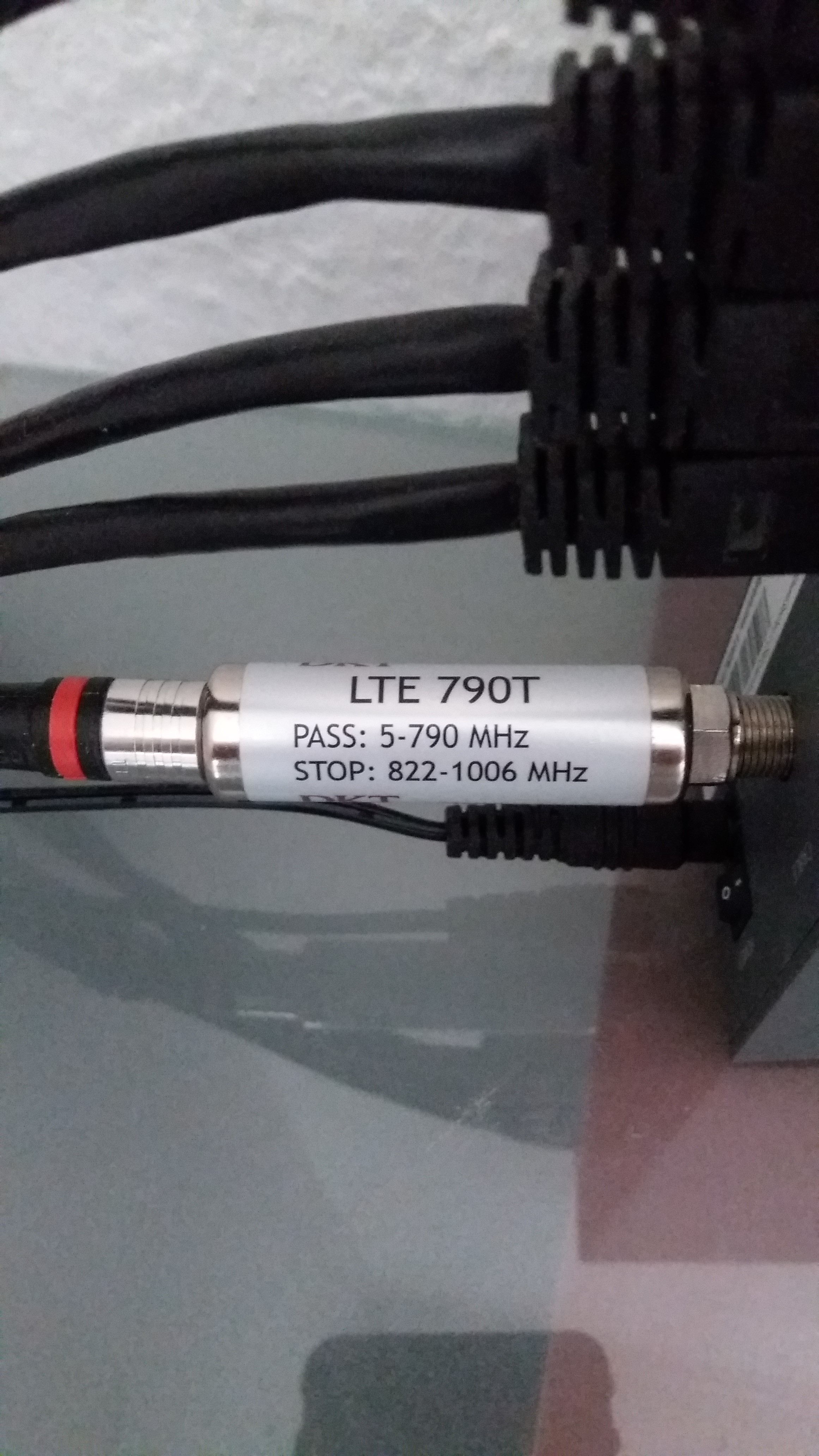 LTE Filter